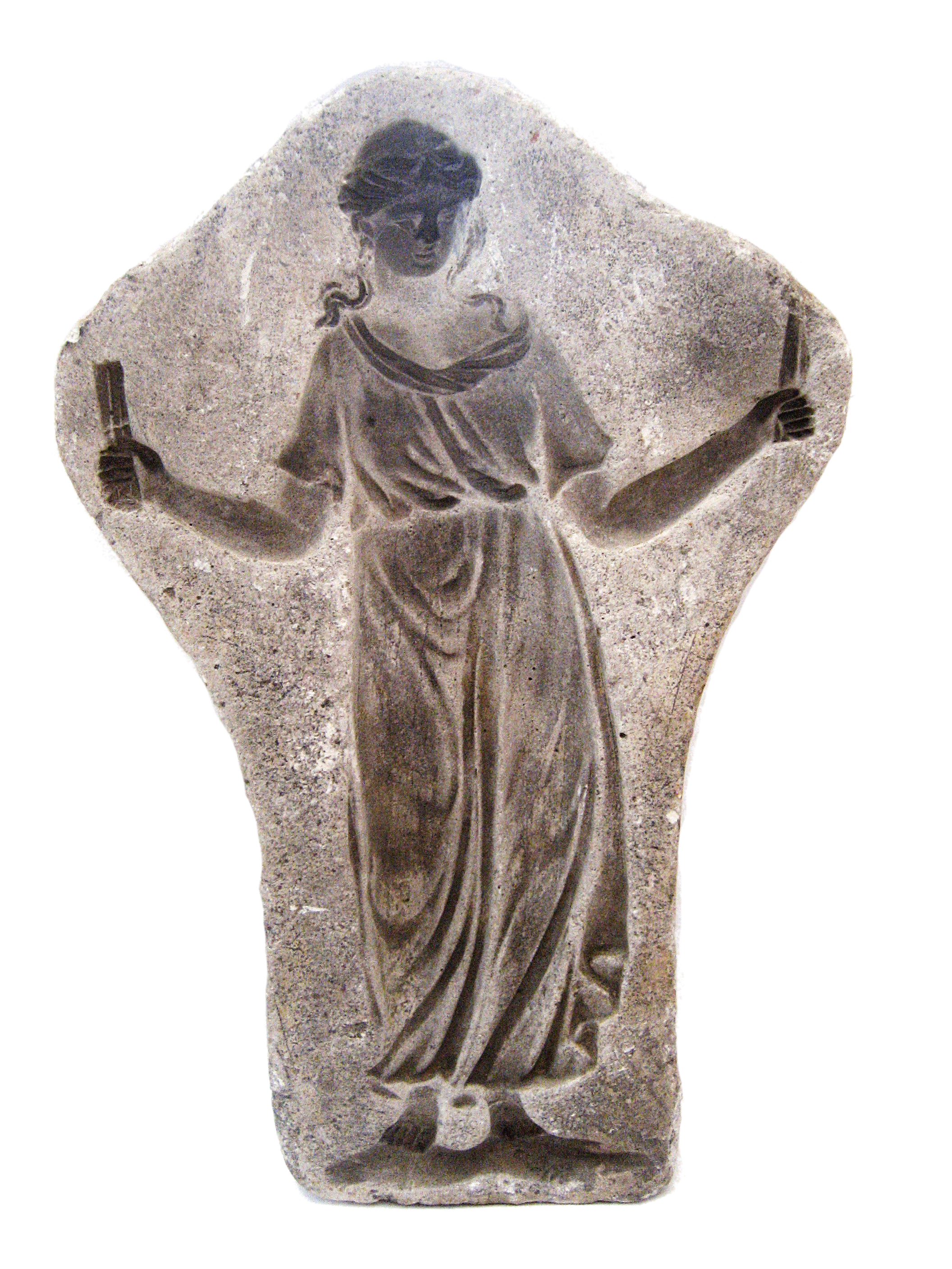 Matrize mit Tanzender aus St. Georgen / Rottal